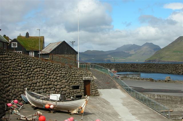 Hestur, Faroe Islands